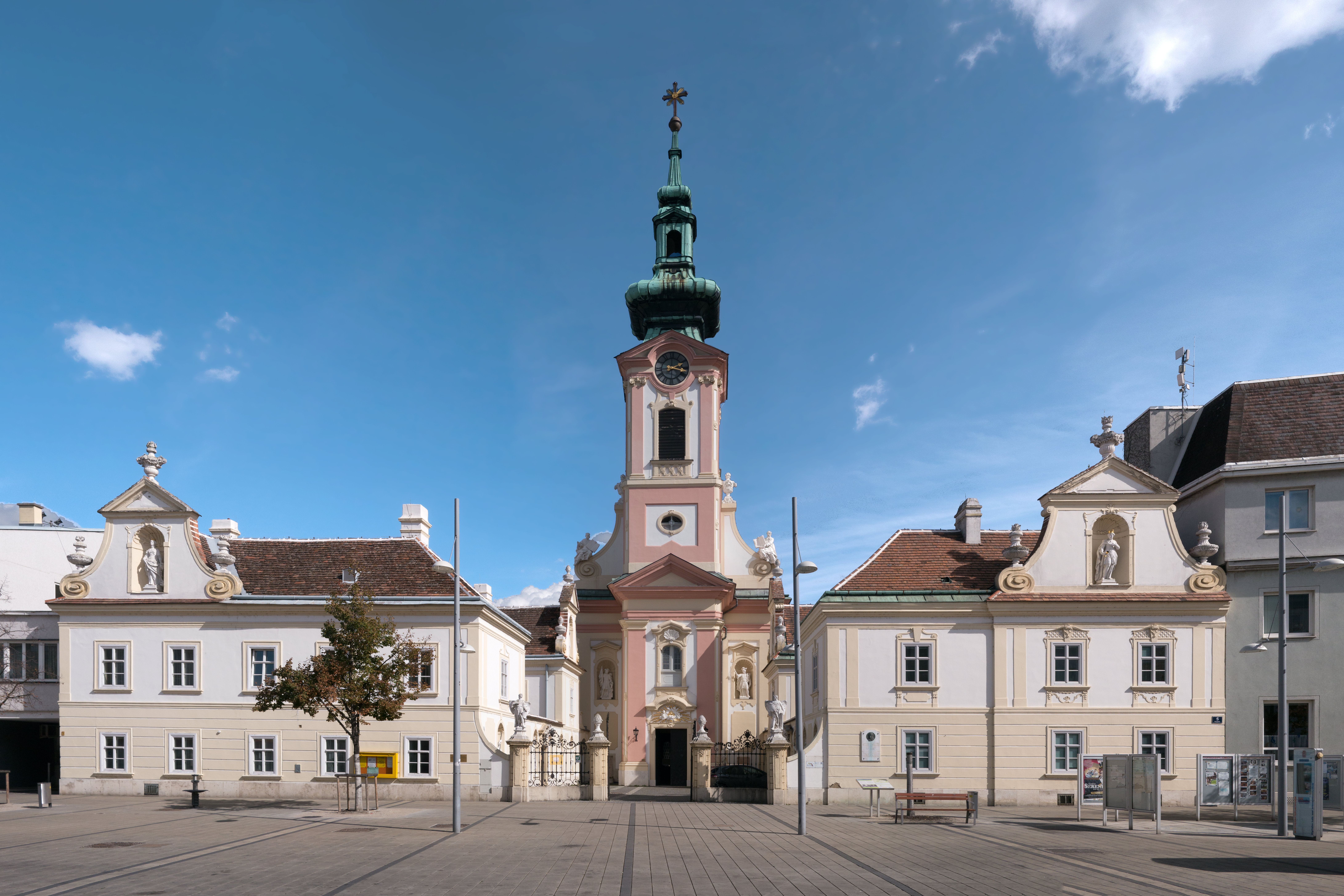 Kath. Pfarrkirche hl. Jakob und Pfarrhof